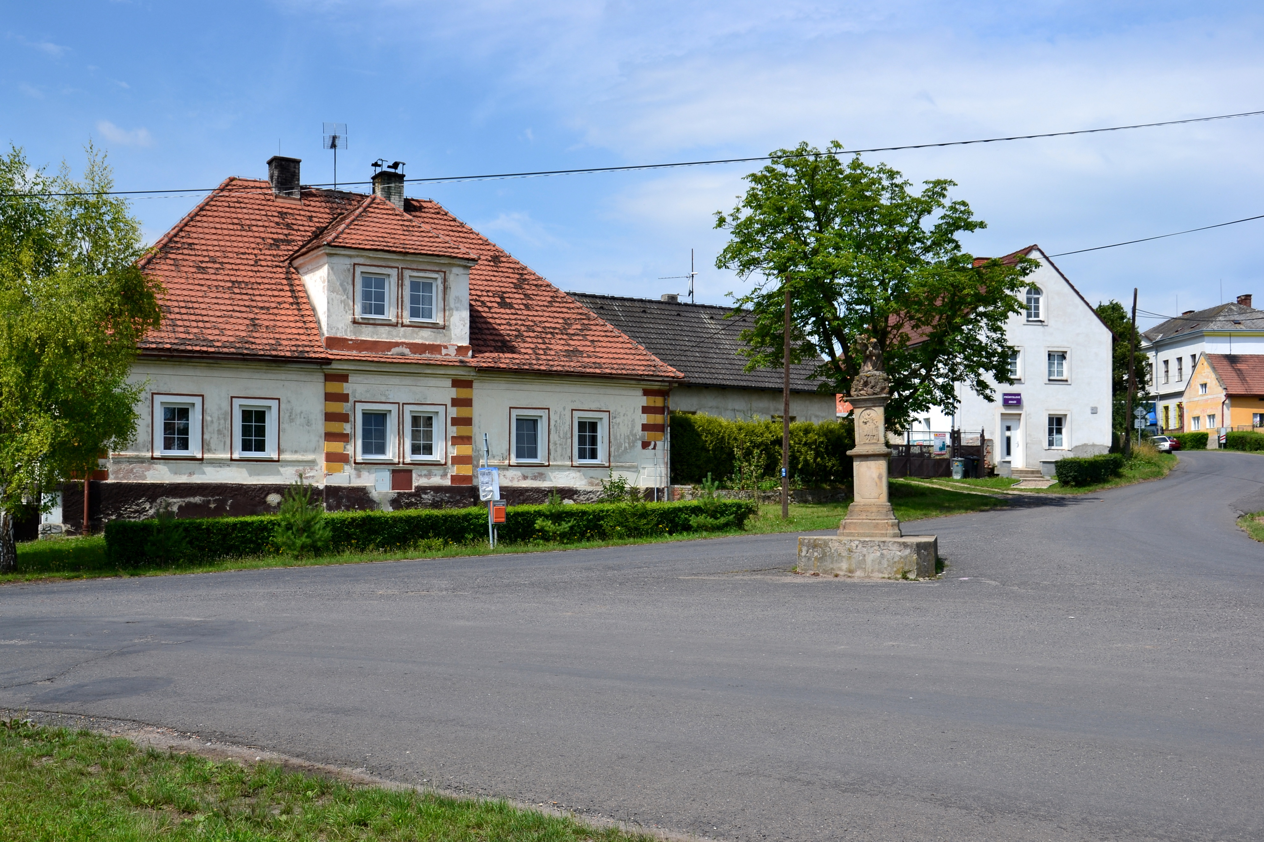 Náves v Kněžicích